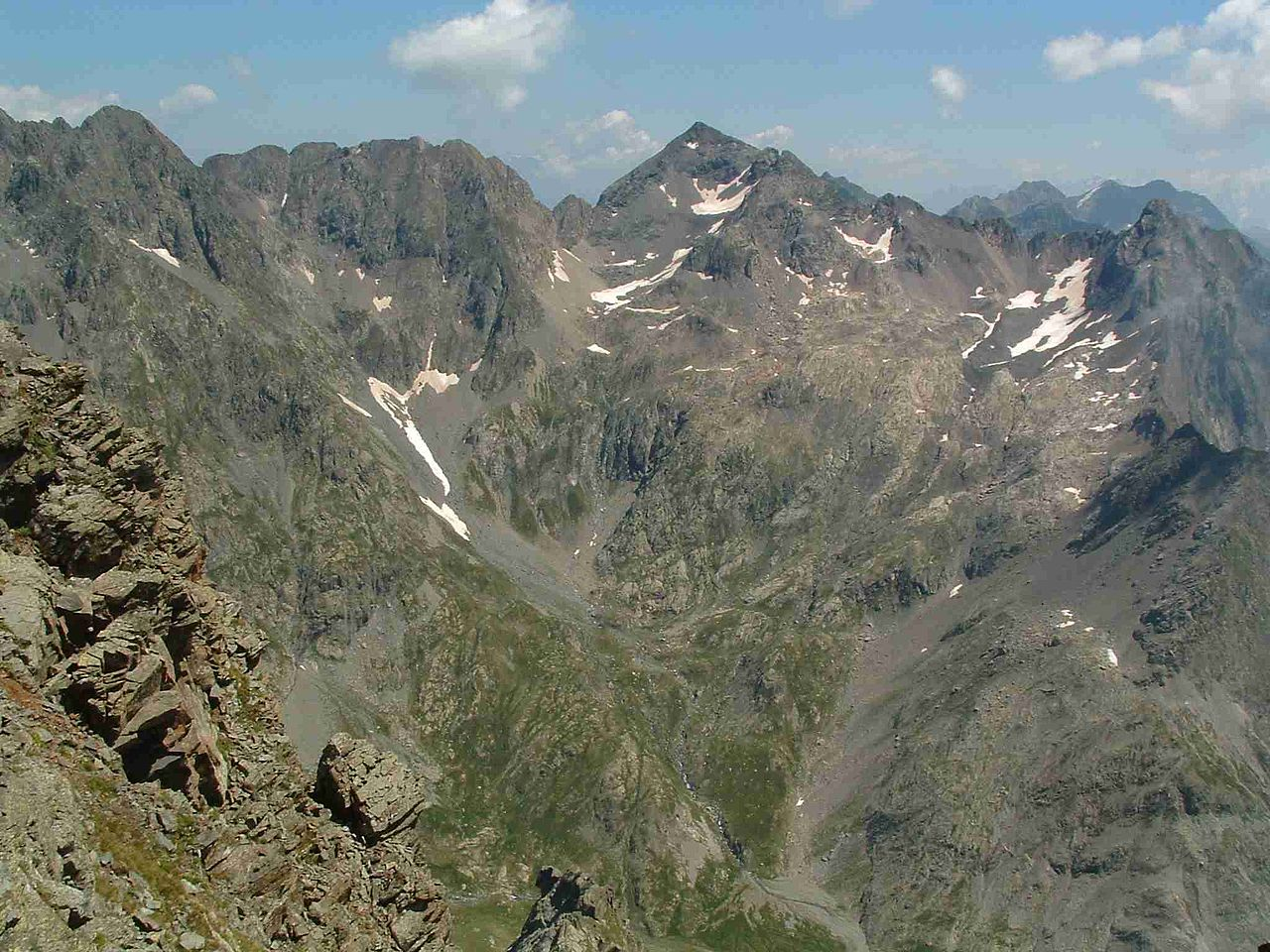 Foto del Diavolo della Malgina, di Orobicon